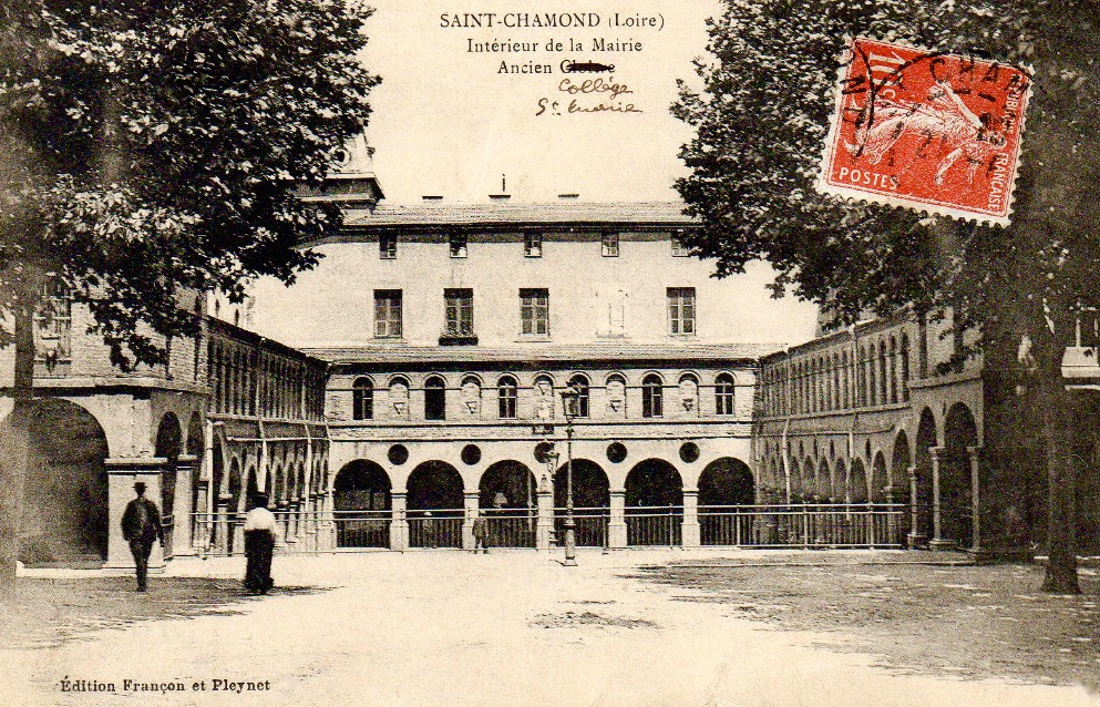 Ancien collège Sainte-Marie à Saint-Chamond. James Condamin y étudia à partir de 1858. (carte postale ancienne)